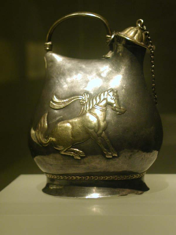 鎏金舞马衔杯纹仿皮囊银壶 器形仿中国北方游牧民族的皮囊壶，壶的两面各饰有一匹衔杯的舞马，旧说舞马始于zh:唐明皇，但据考证舞马起于zh:曹魏。 本文物zh:1970年发现于zh:陕西zh:西安zh:何家村唐代窖藏，原藏于zh:陕西历史博物馆，藏品号七一48，通高14.8厘米，口径2.3厘米，壁厚0.12厘米，重549克。 zh:2004年7月展出于zh:北京大学zh:赛克勒考古与艺术博物馆，User:Mountainzh:2004年zh:7月28日拍摄。拍摄者已授权依照GFDL协议发布该图像。